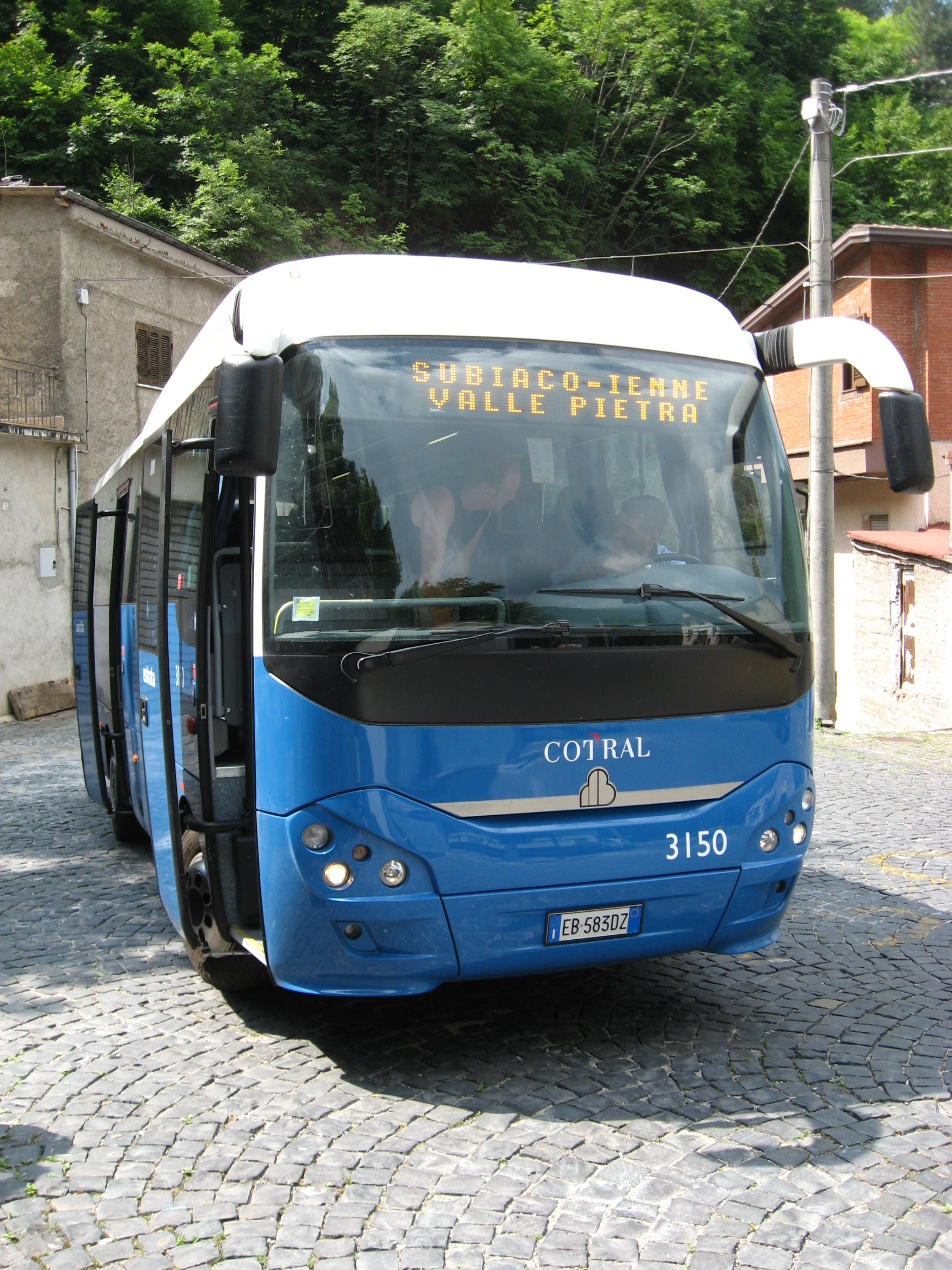 Lokale bus in de Lazio provincie